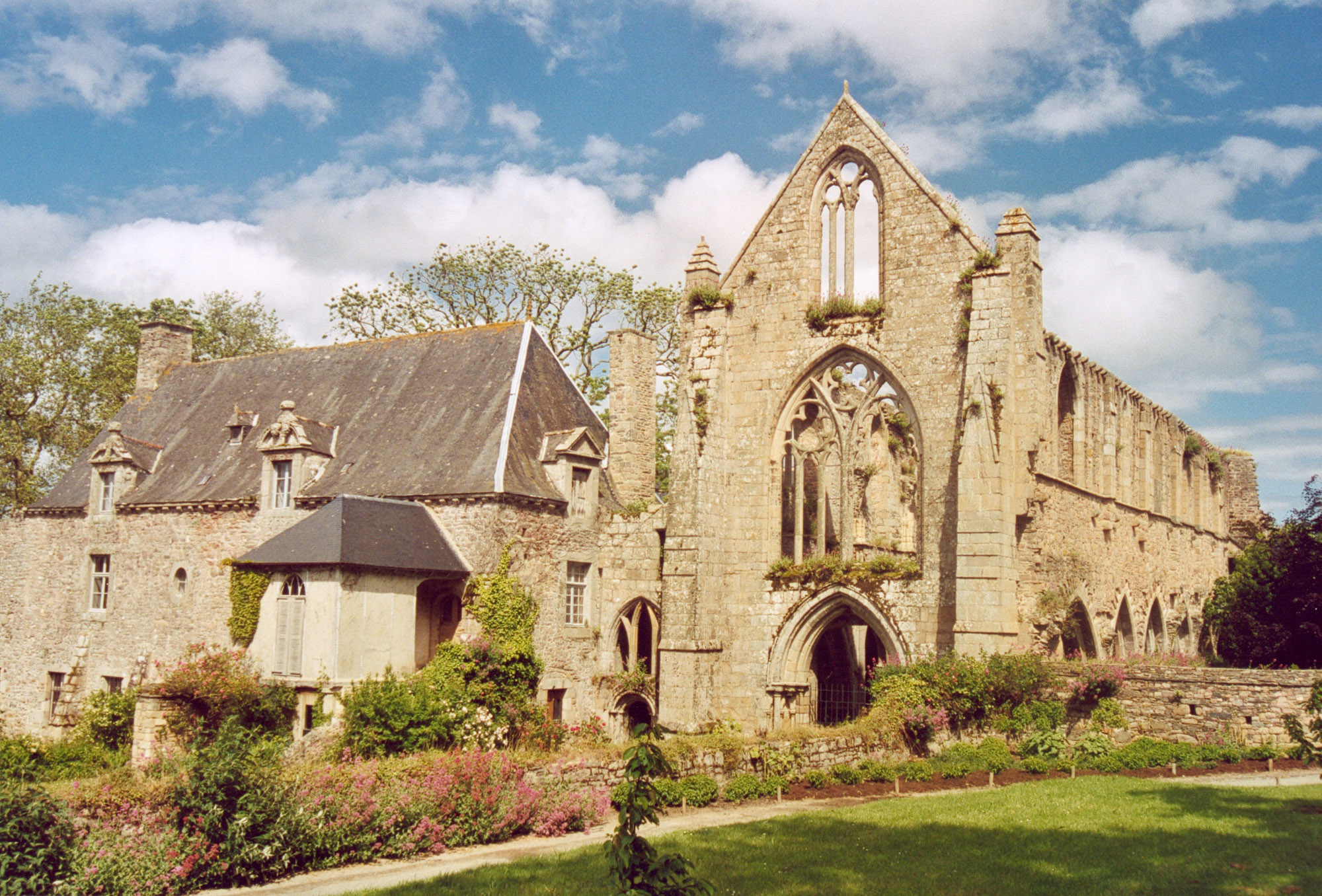 Bretagne Kérity Abbaye de Beauport Auteur : GIRAUD Patrick